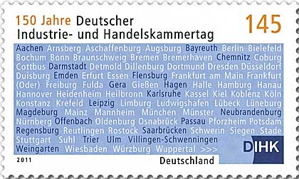 Stamp description / Briefmarkenbeschreibung